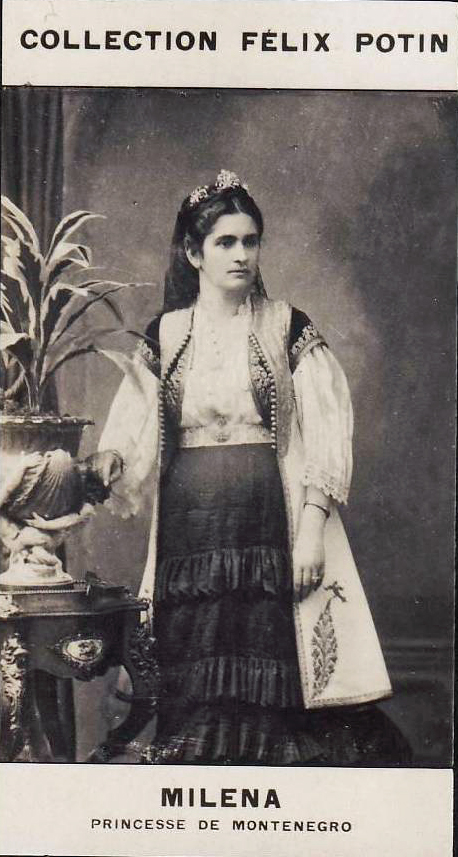 Milena, princesse de Montenegro